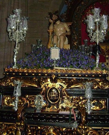 Imagen actual de Nuestro Padre Jesús de la Paciencia (Andújar)